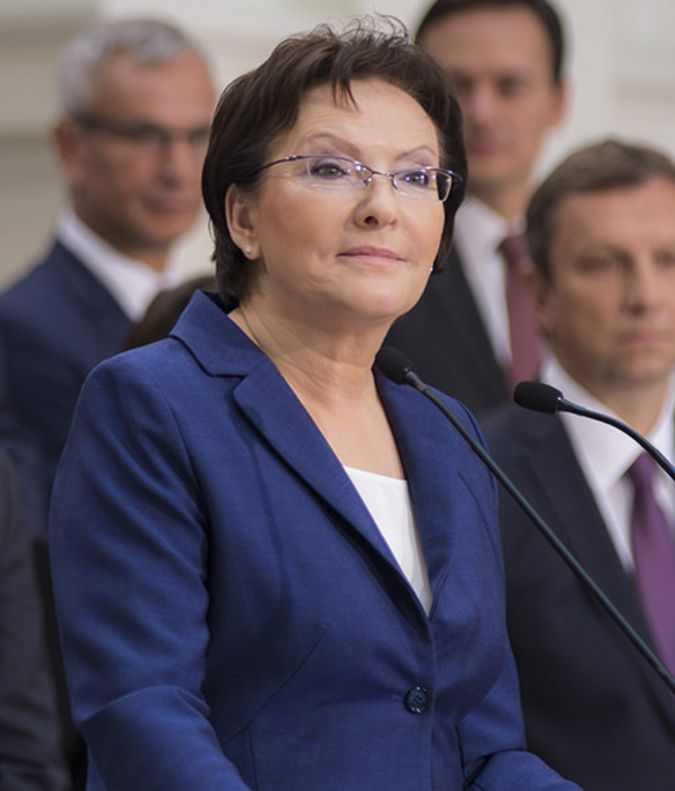 Przedstawienie kandydatów na ministrów w rządzie Ewy Kopacz